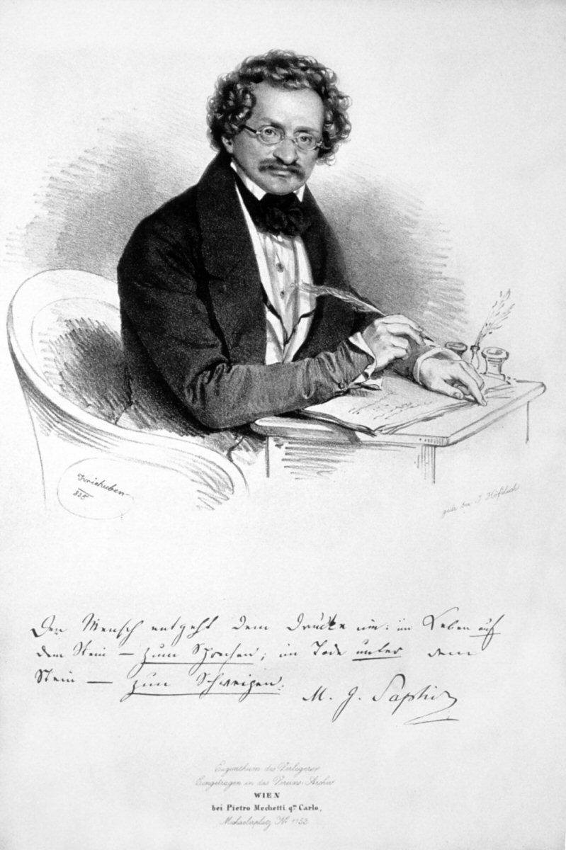 Moritz Gttlieb Saphir, Lithographie von Joseph Kriehuber, 1835 Unterschrift Facsimile: Der Mensch entgeht dem Drucke nie: im Leben auf dem Stein – zum Sprechen; im Tode unter dem Stein – zum Schweigen. M. G. Saphir. Wien bei Pietro Mechetti qm Carlo